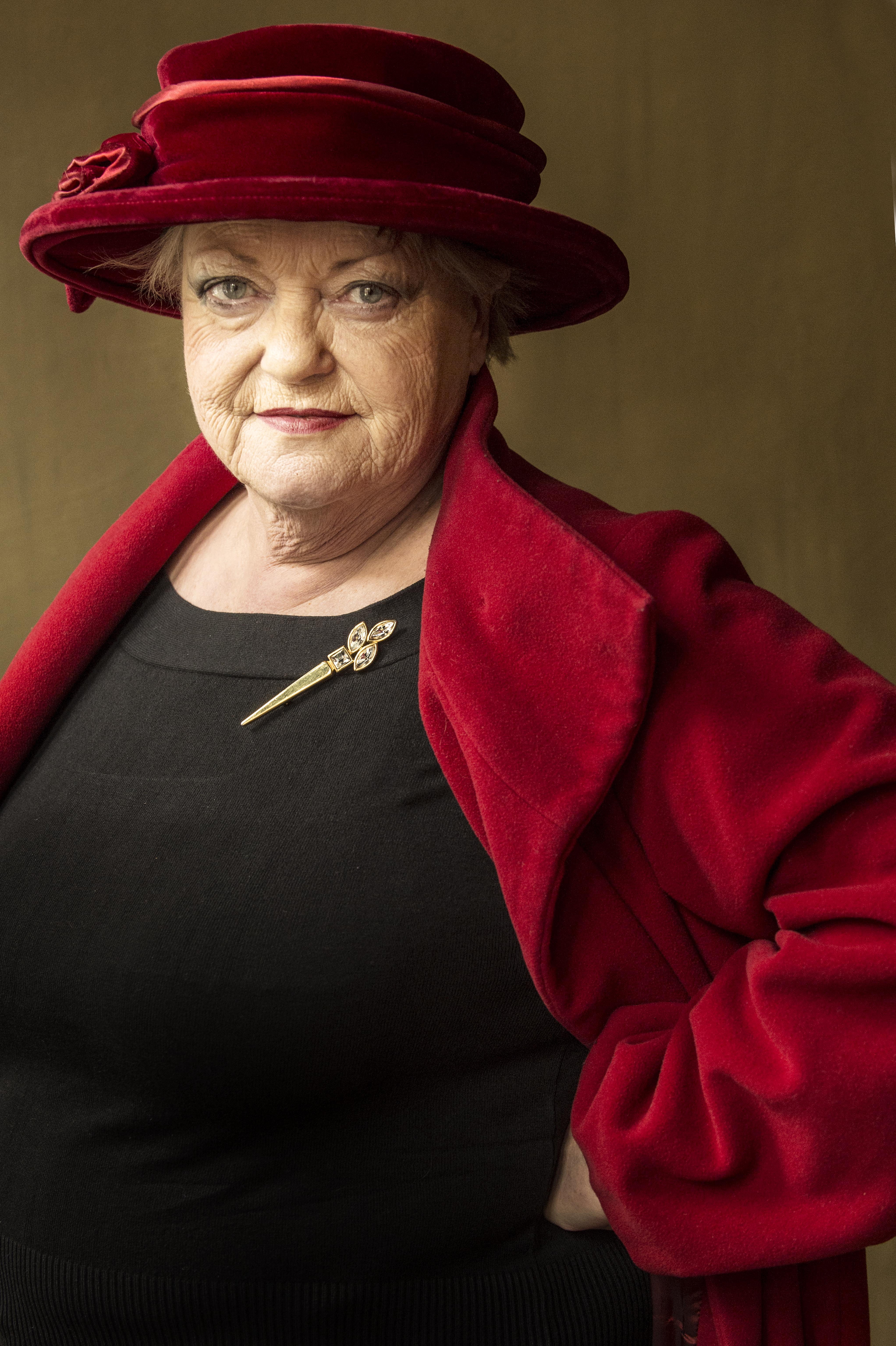 Viviane De Muynck, actrice.